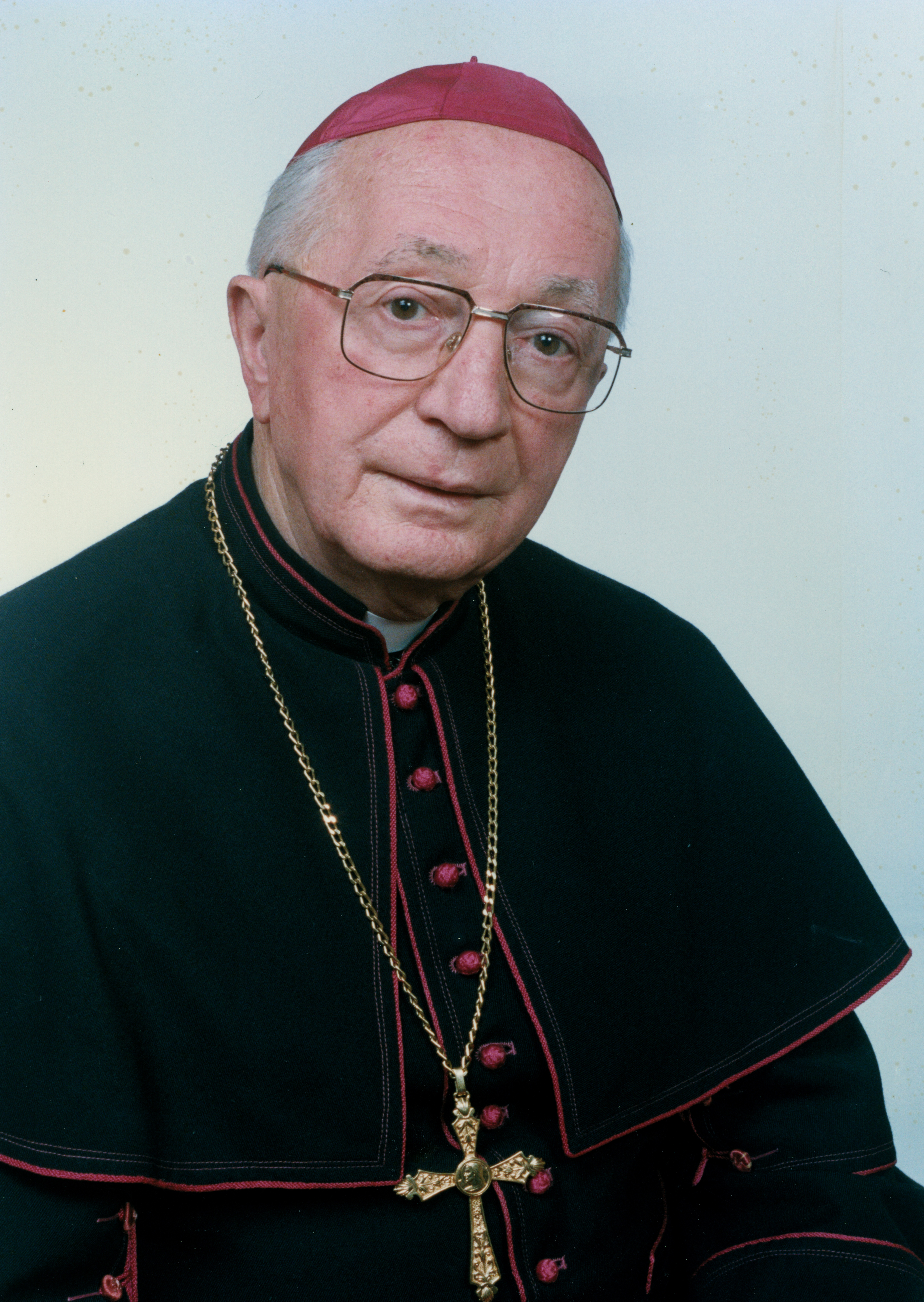 Ján Hirka, oficiálna fotografia z r. 1996